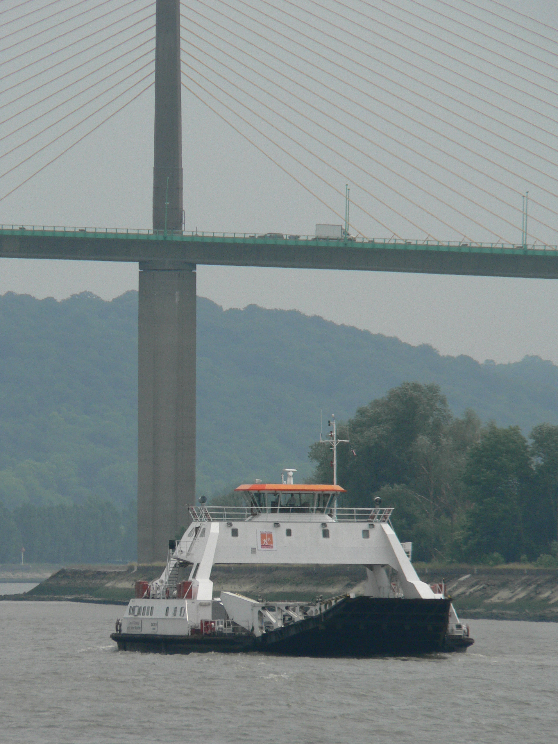 Bac 21 en transit sous le pont de Brotonne Photo prise le 19 juin 2006 Auteur : Marc Liger Copyright : image sous GFDL Marc Liger Licensing Catégorie:Image maritime